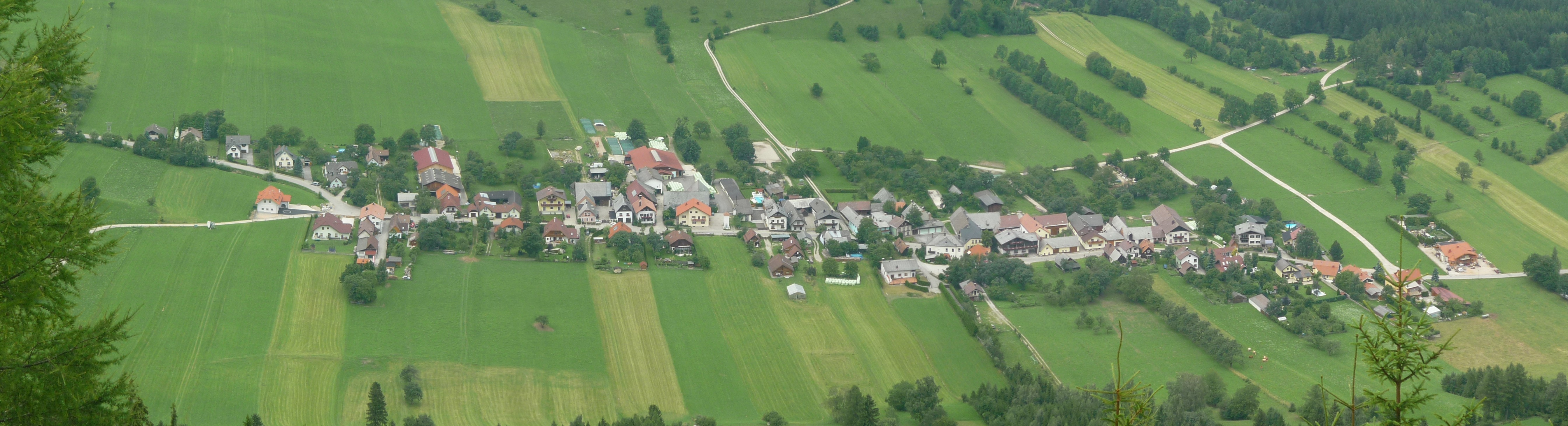 Die Katastralgemeinde Schneebergdörfl in Puchberg am Schneeberg, Österreich.